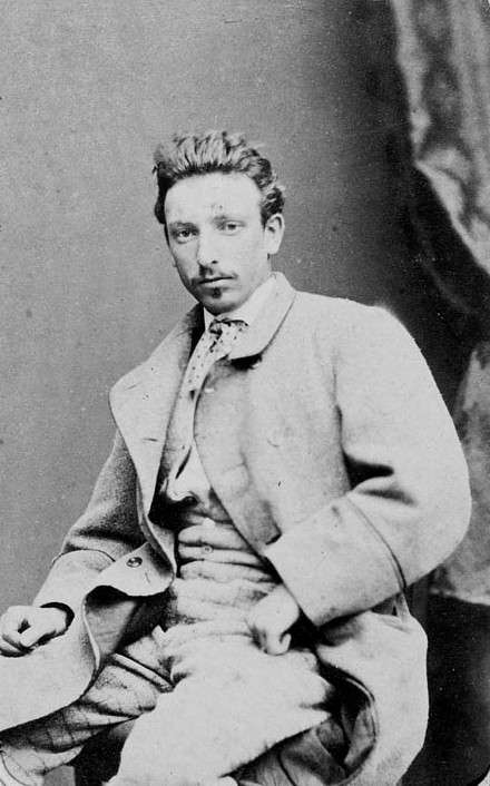 Giuseppe Nodari